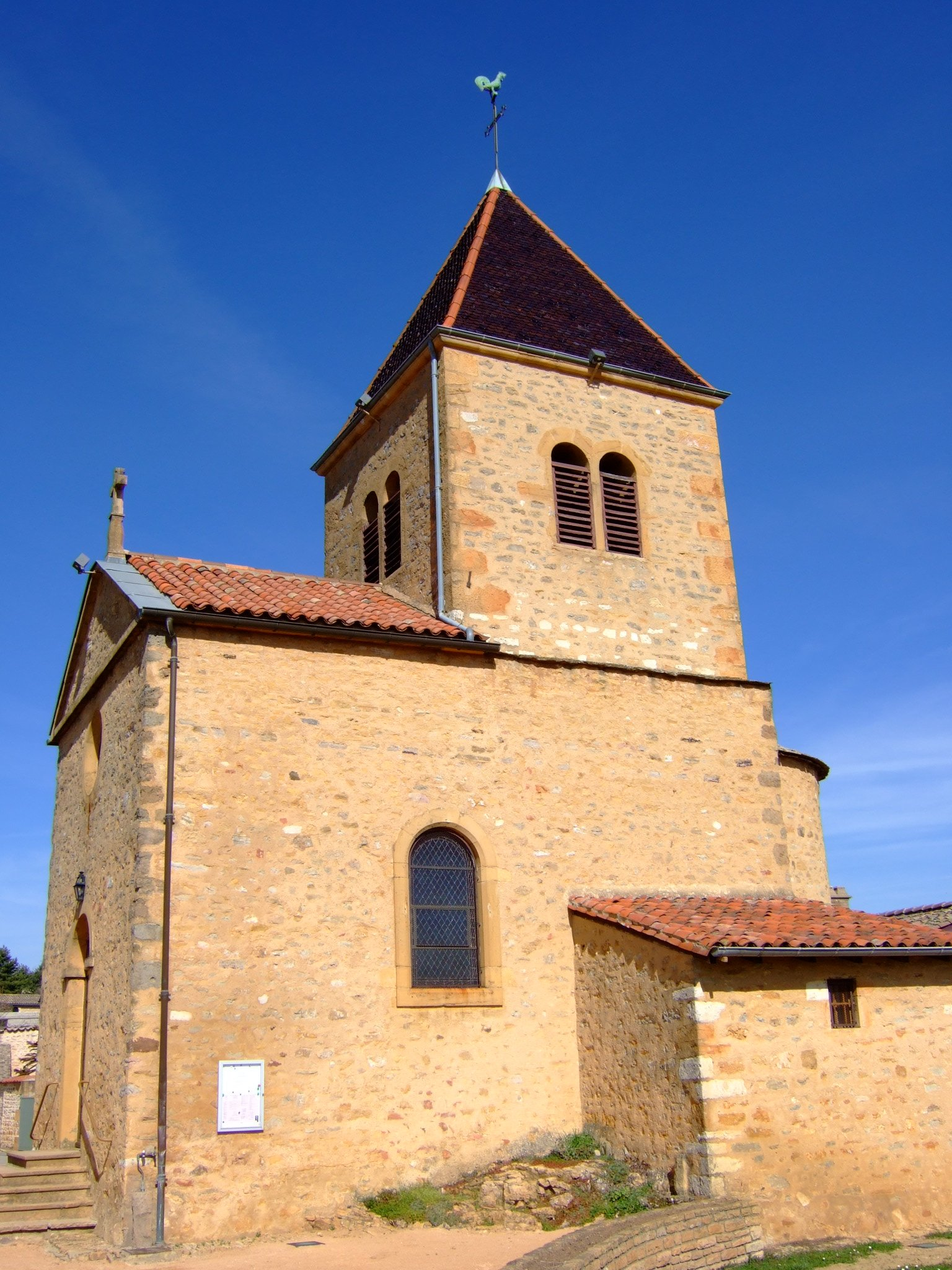 L'église de Saint-Jean-des-Vignes